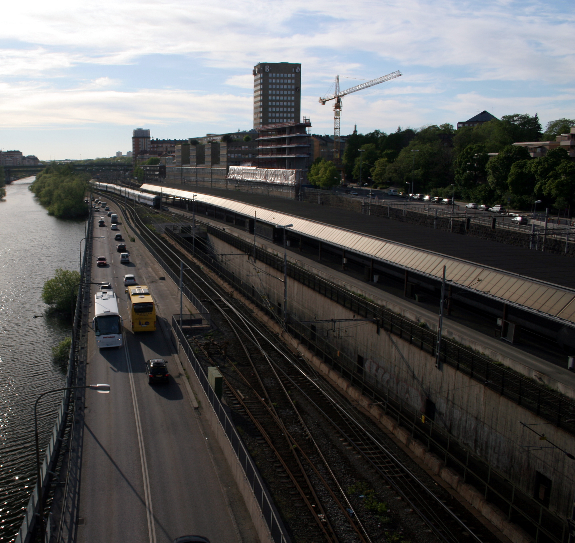 Klarastrandsleden, Stockholm, northbound. Picture taken from Barnhusbron.